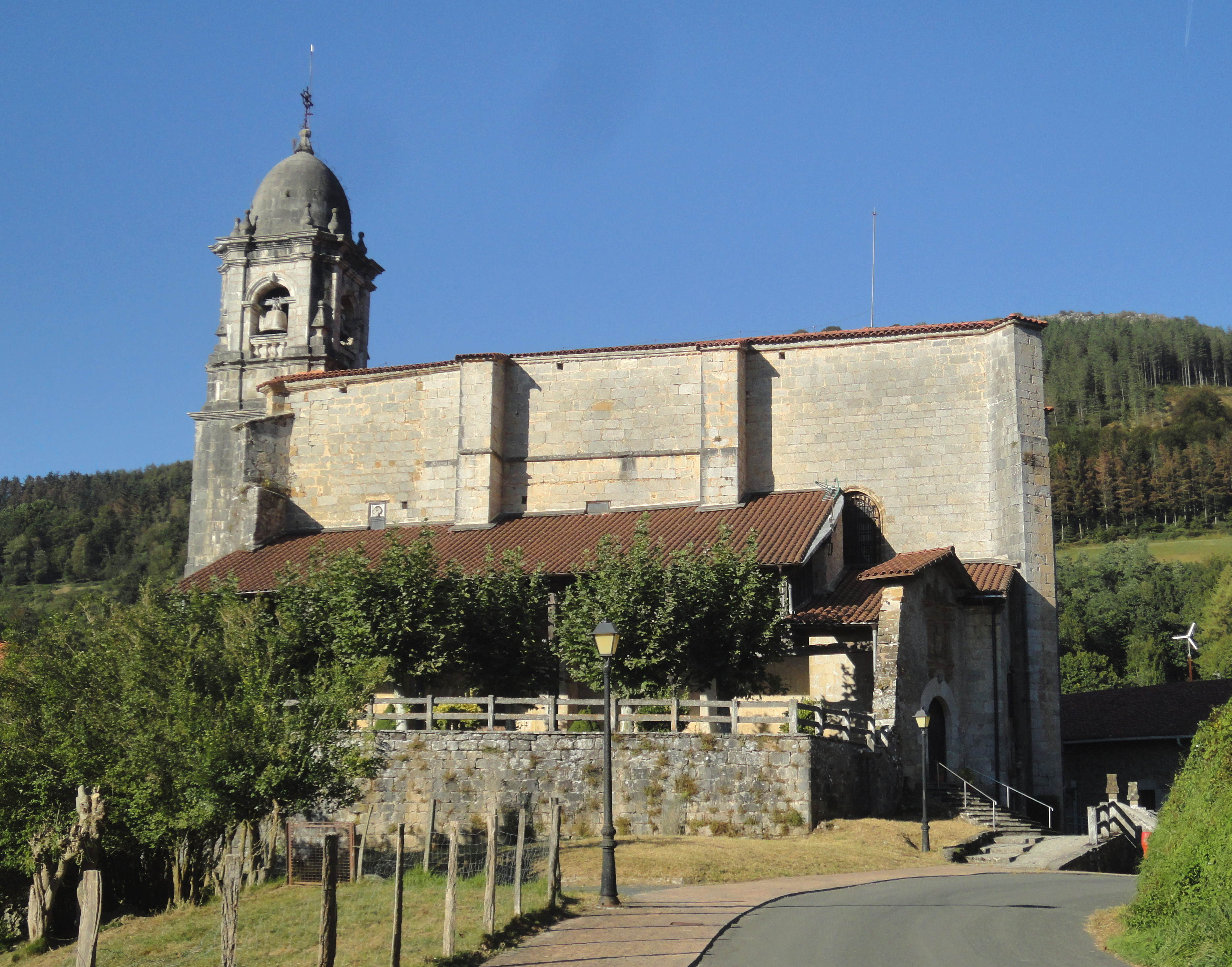 Asuntziongo eliza - Gaztelu (Gipuzkoa)